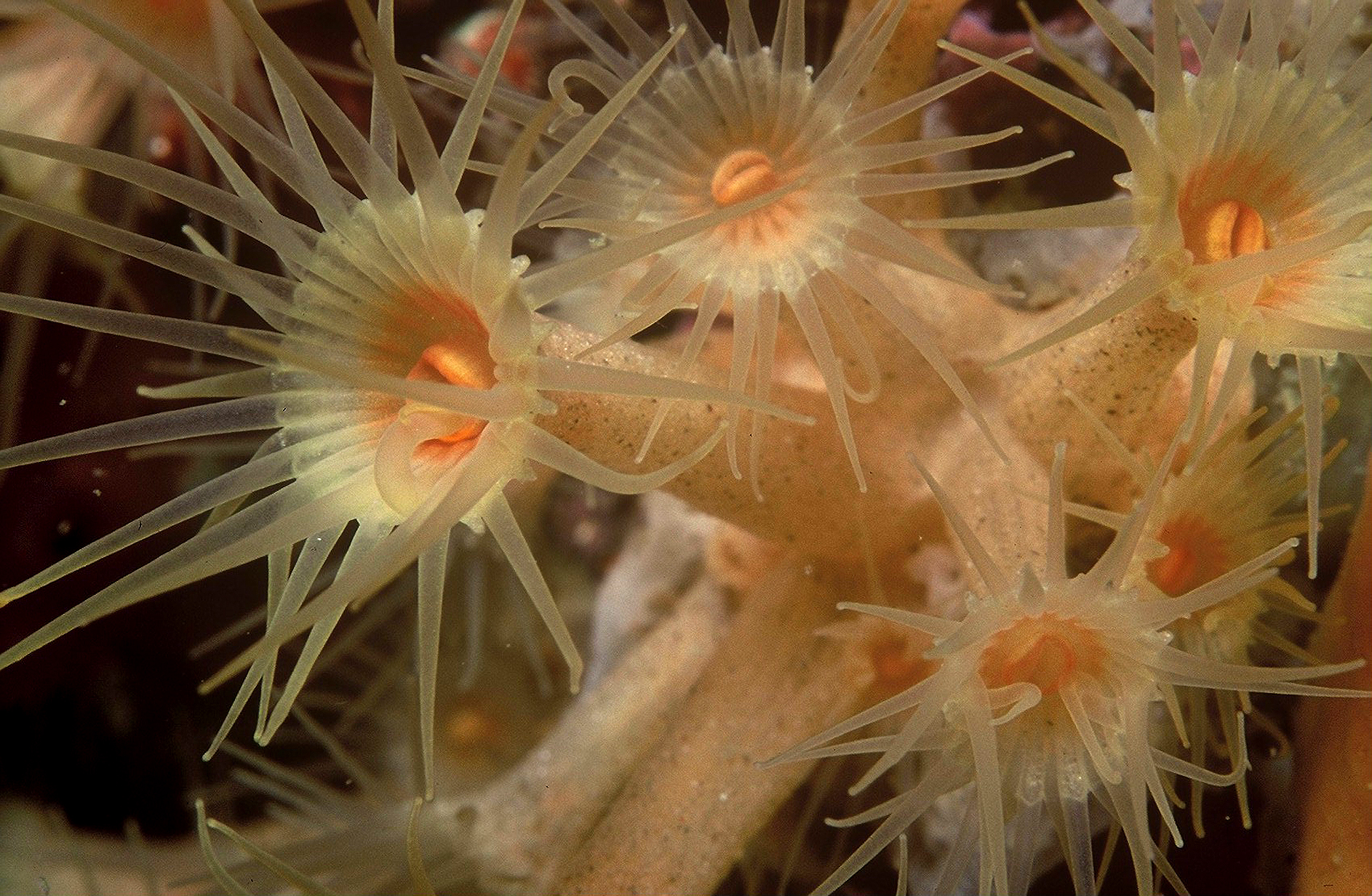 Parazoanthus axinellae (Schmidt, 1862) - Banyuls-sur-Mer : 07/92